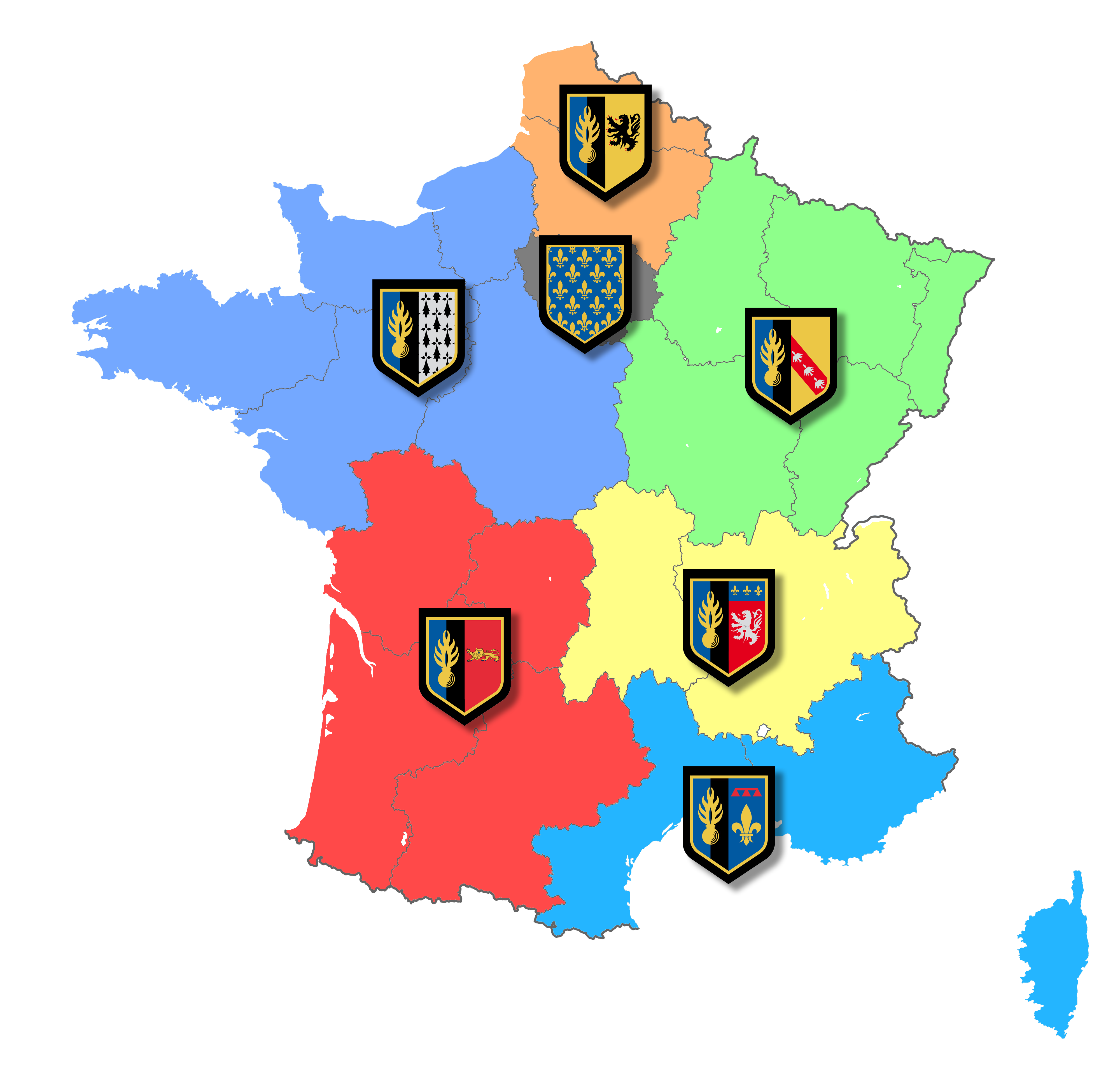 Carte des régions zonale de la Gendarmerie en 2005. Force de Gendarmerie mobile et d'intervention Région de Gendarmerie de Bordeaux Région de Gendarmerie de Rennes Région de Gendarmerie de Sathonay-Camp Région de Gendarmerie de Marseille Région de Gendarmerie de Metz Région de Gendarmerie de Lille